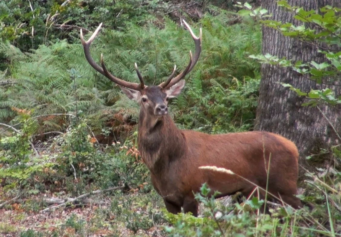 Sur ses gardes, ce cerf élaphe guette et protège son territoire de tout autre concurrent tout en étant à la recherche de biches pour lesquelles il signale sa présence en bramant...